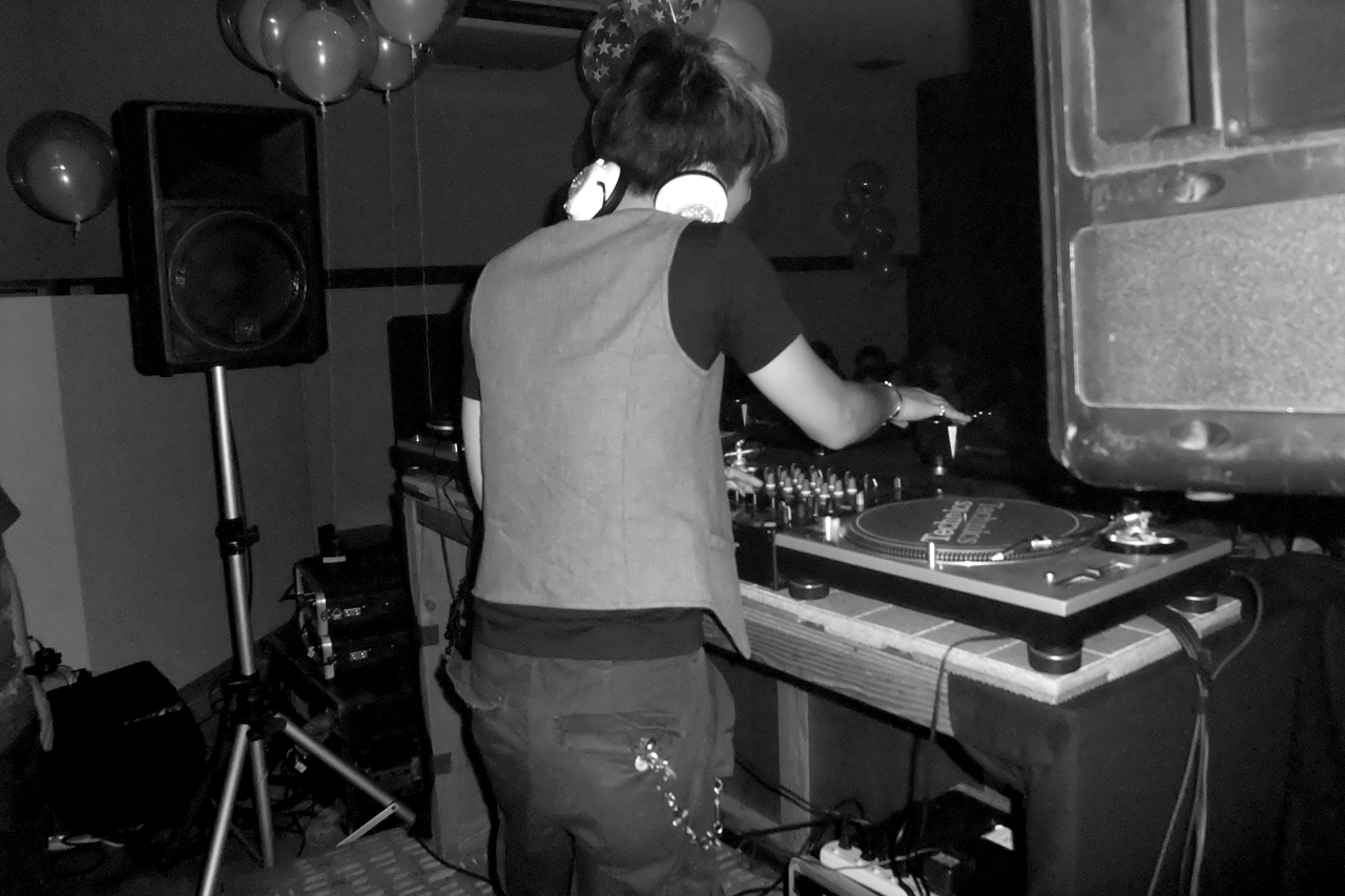 Guest DJ: MAKAI